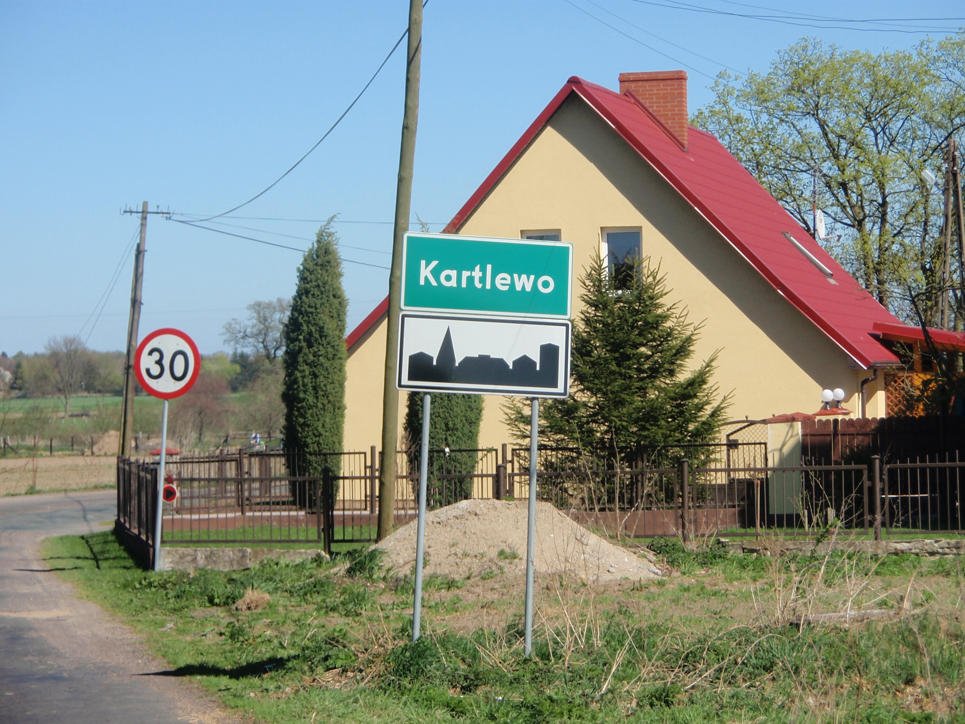 Kartlewo